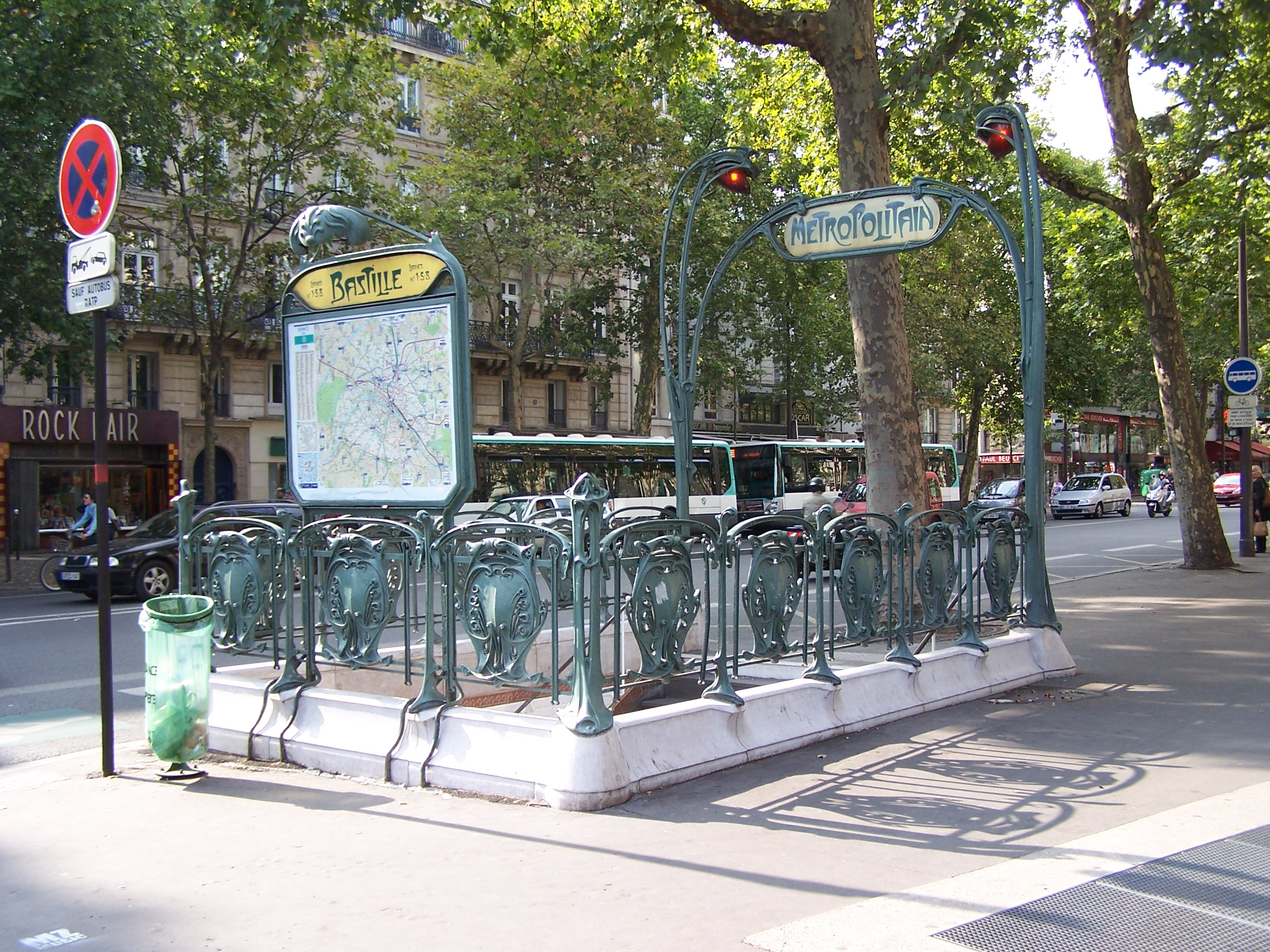 L'édicule de la station de métro Bastille, boulevard Beaumarchais, Paris. Cet édicule, initialement localisé à la sortie du métro rue de Lyon fut transféré bd Beaumachais lors de la construction de l'opéra Bastille. Il est classé MH depuis 1978.